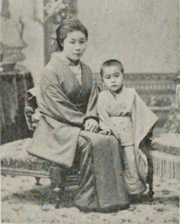 一瀬勇三郎の妻スミ子と長男卓郎